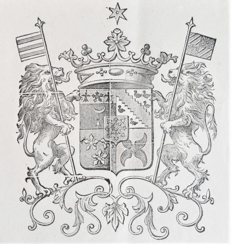 Blasons de la famille du buat